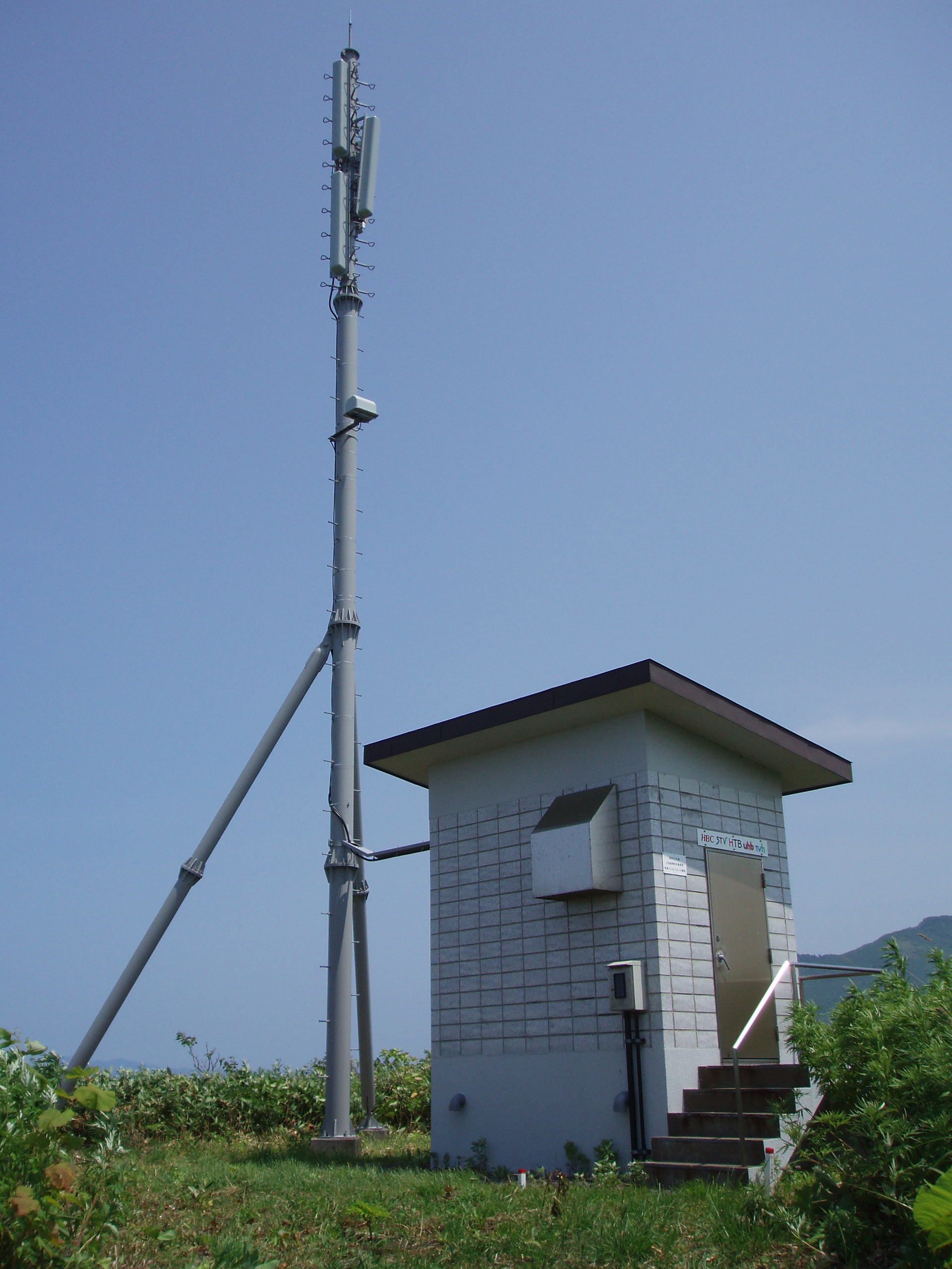 寿都中継局（民放）